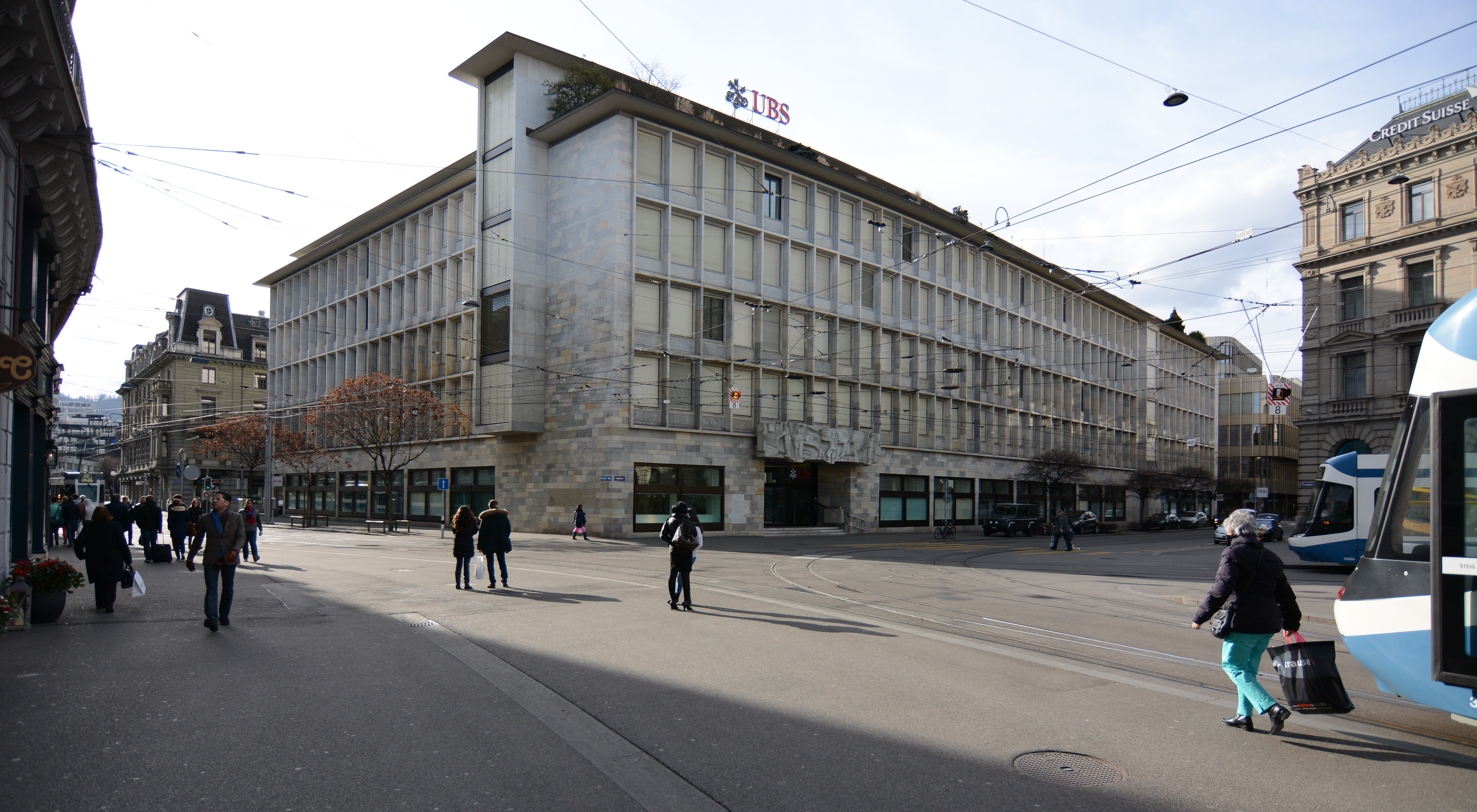 Hauptsitz des Schweizerischen Bankvereins, Zürich, 1956. Architekt: Roland Rohn